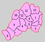 山口県美祢郡の町村制時点の町村。